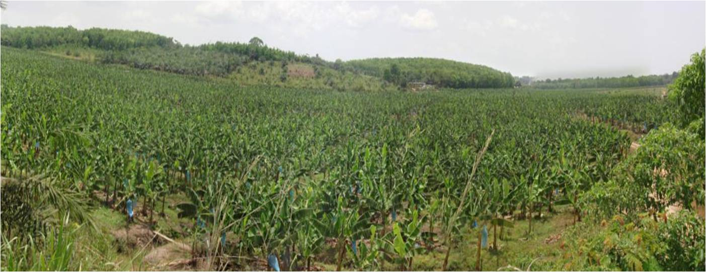 plantation industrielle de banane (Côte d'Ivoire)